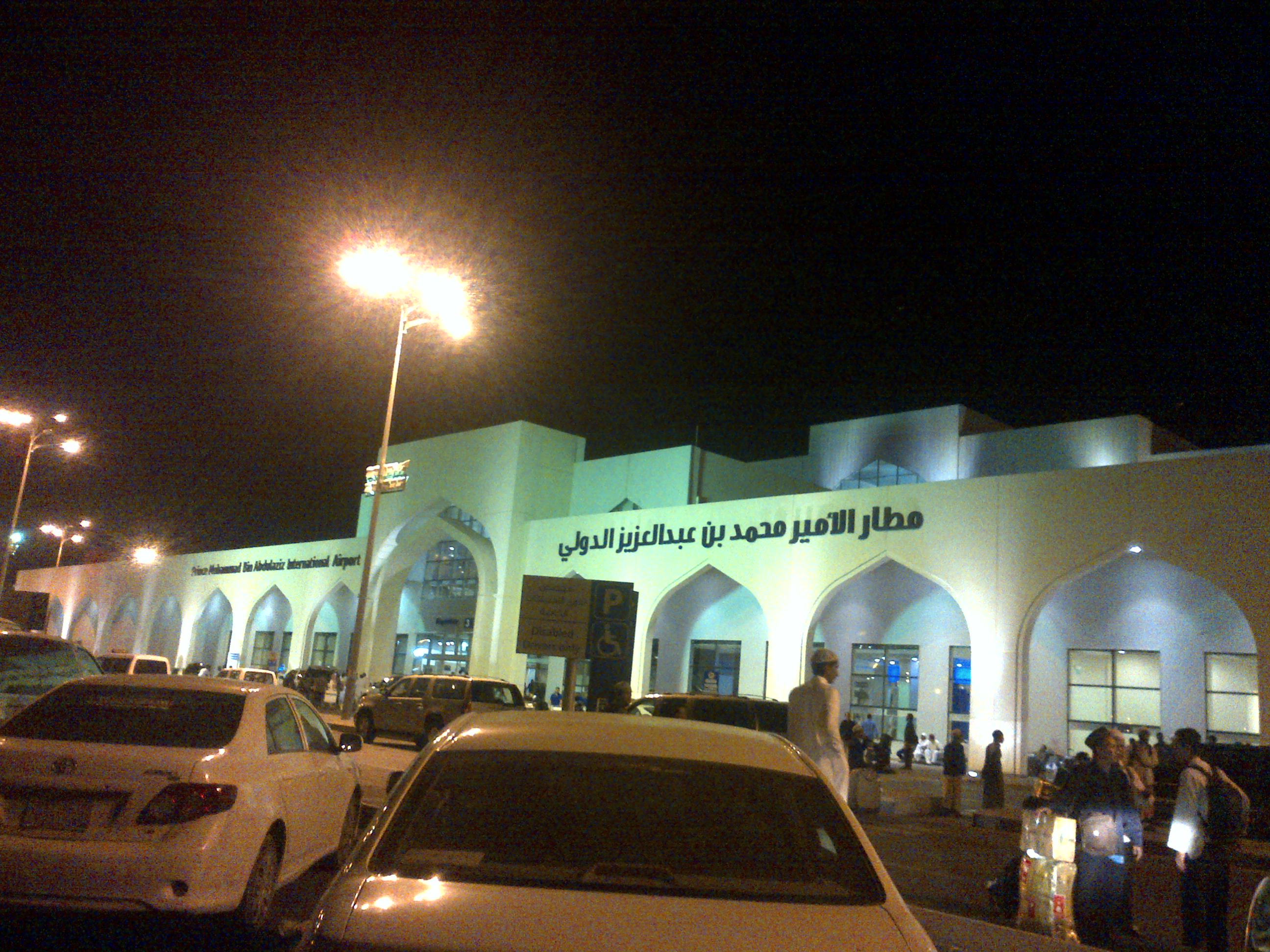 Terminal Kedatangan Bandar Udara Internasional Prince Mohammad bin Abdul Aziz, Kota Madinah terlihat dari Parkiran